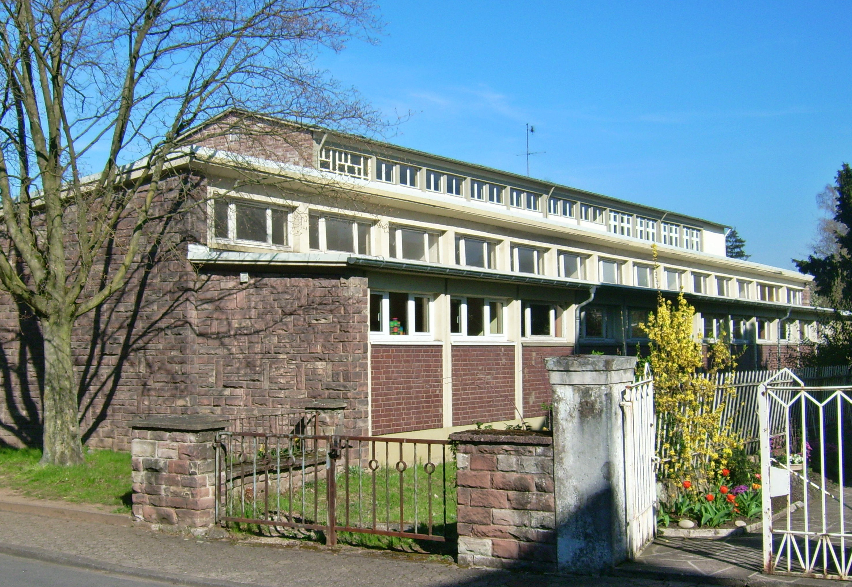 Odilienschule